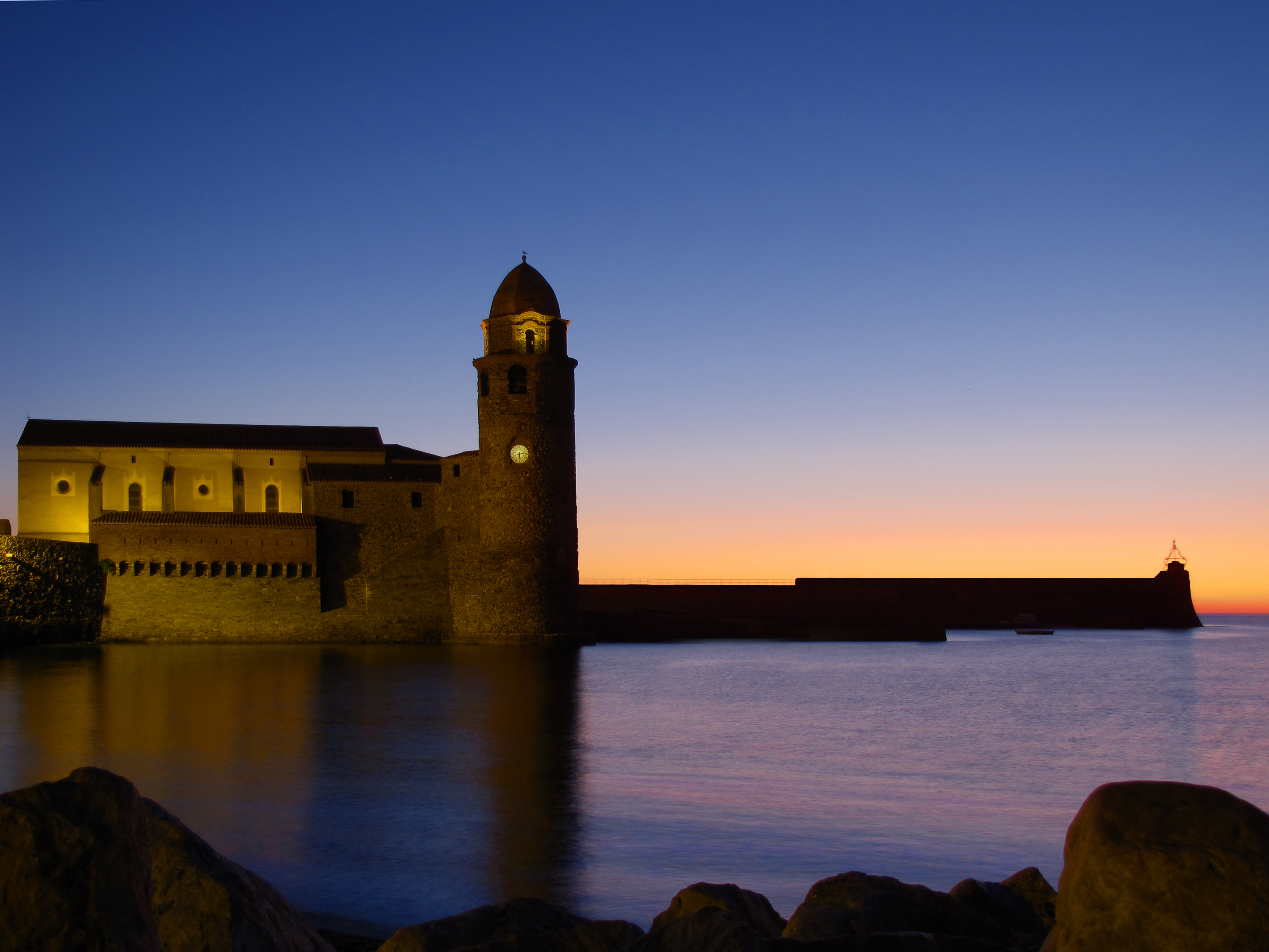 Vista de matinada de l'església de Santa Maria de Cotlliure amb l'antic far convertit en campanar, Cotlliure (Pirineus orientals, Llenguadoc-Rosselló, França